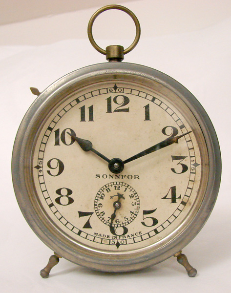 Ce type de réveil est fabriqué à partir de 1922 par l'entreprise Bayard de Saint-Nicolas d'Aliermont.